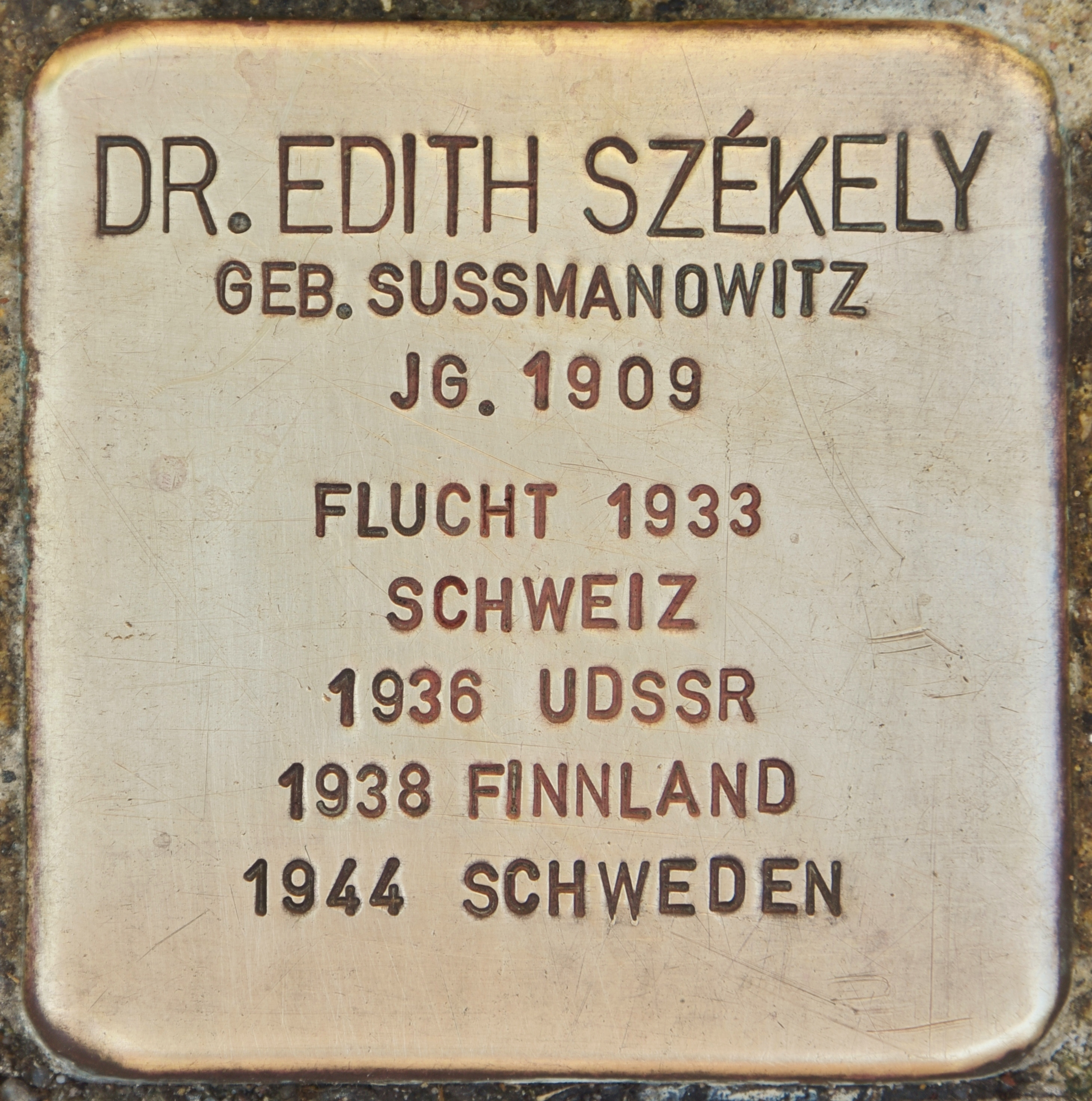 Stolperstein für Dr. Edith Szekely